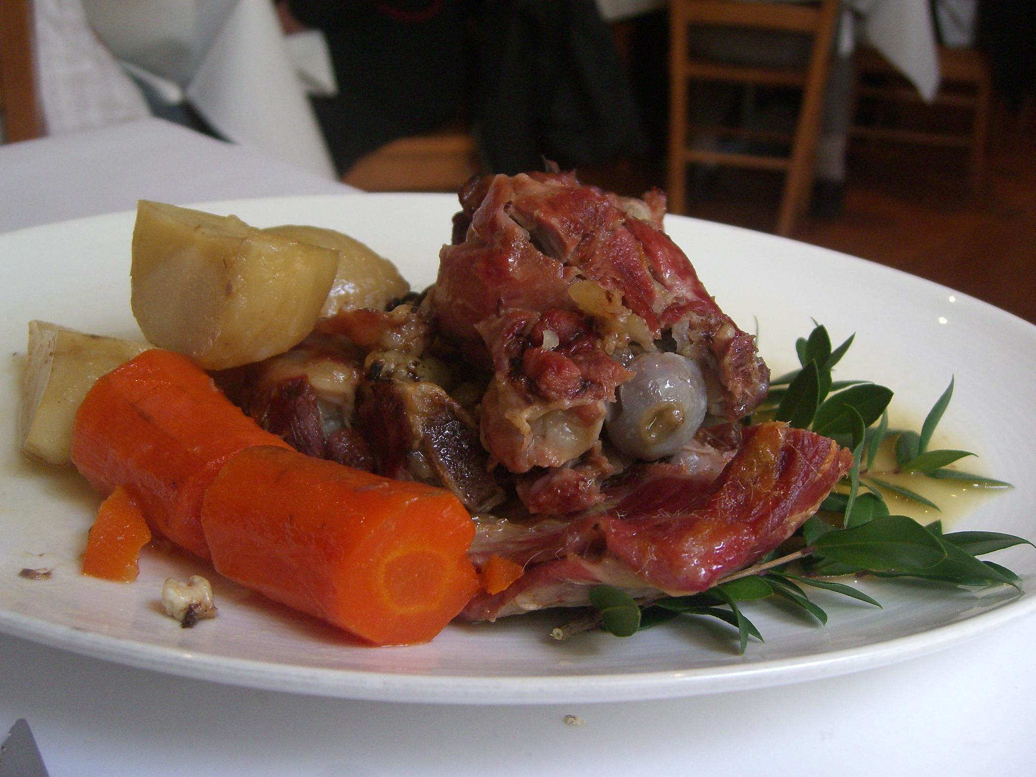 Roasted goat kid.